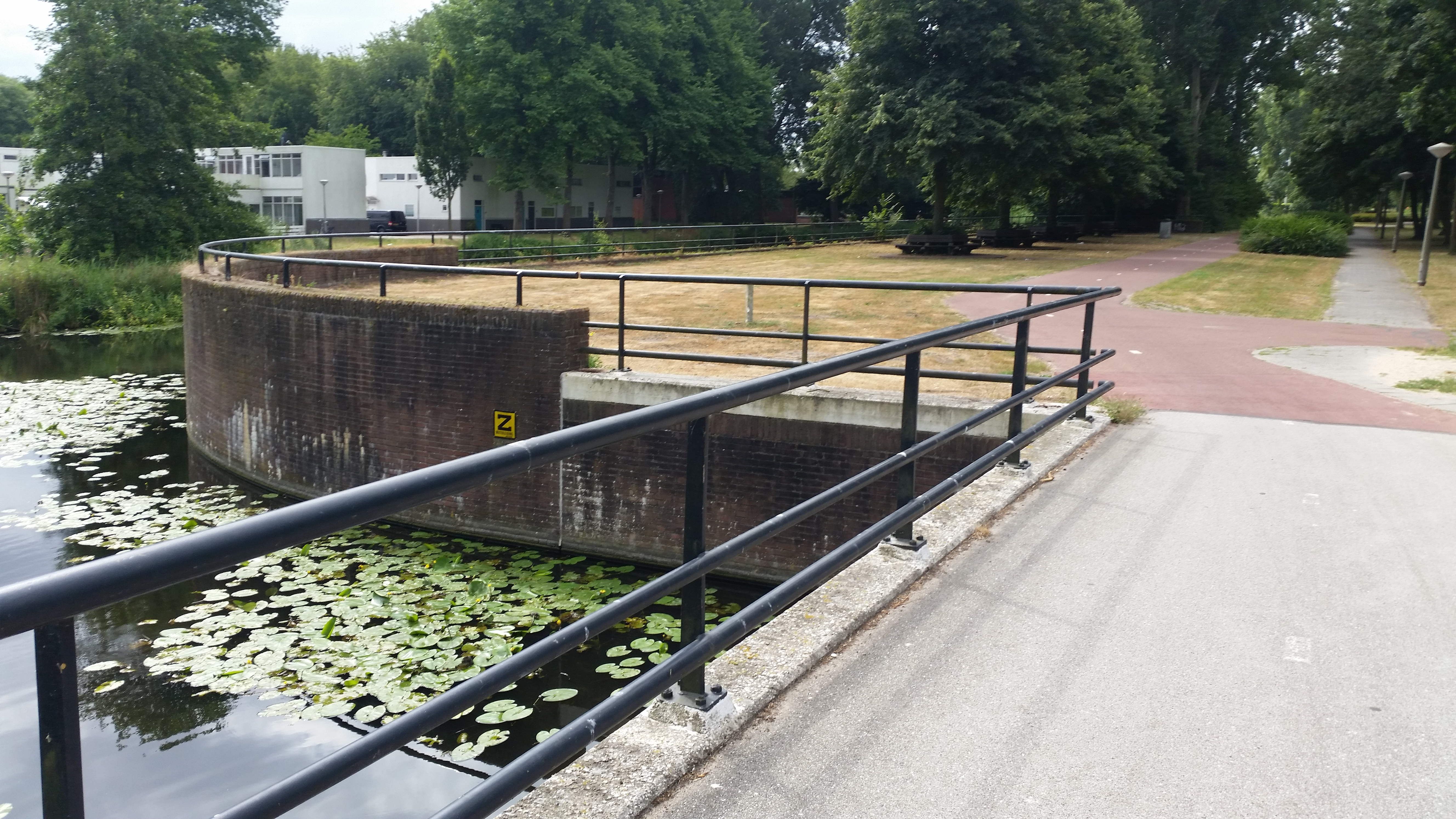 Brug 619 (in Amsterdam), achterliggen plateau